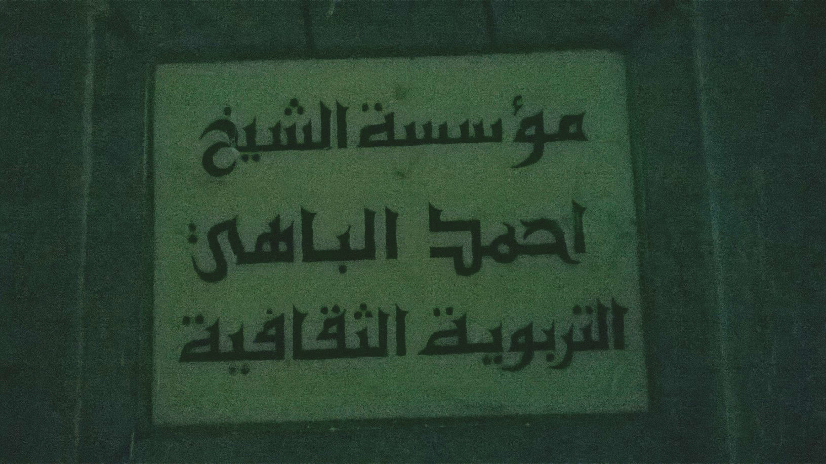 Sidi Alaoui, Bab Lakwes , Tunis